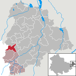 Wildenbörten in Thuringia - District Altenburger Land